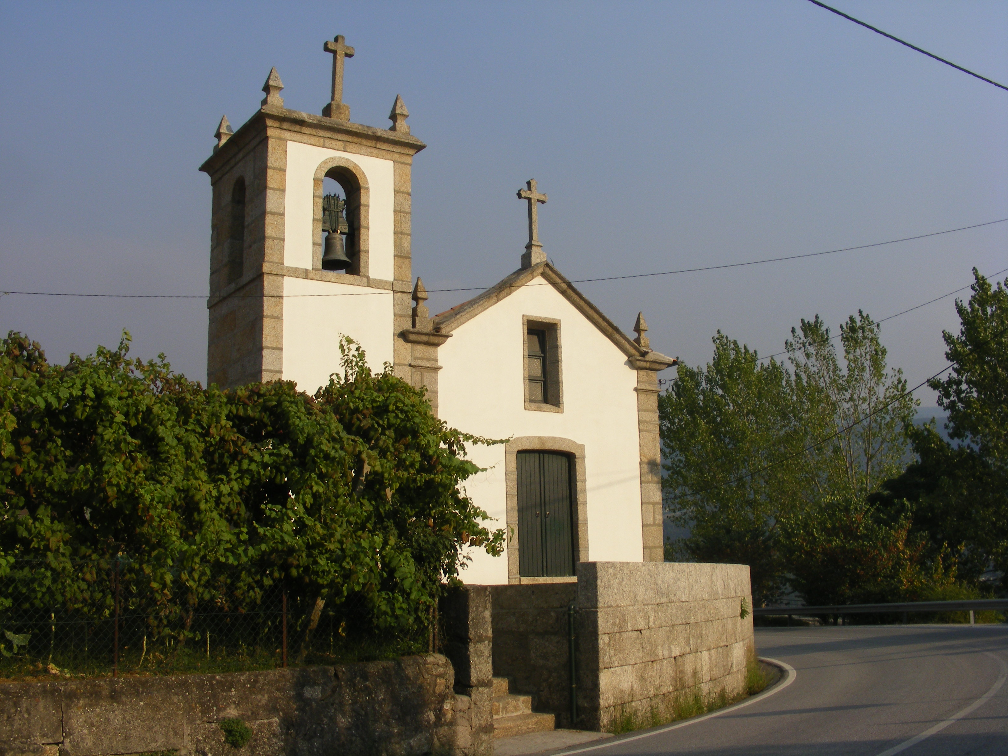 Amarante Igreja Matriz de Padronelo